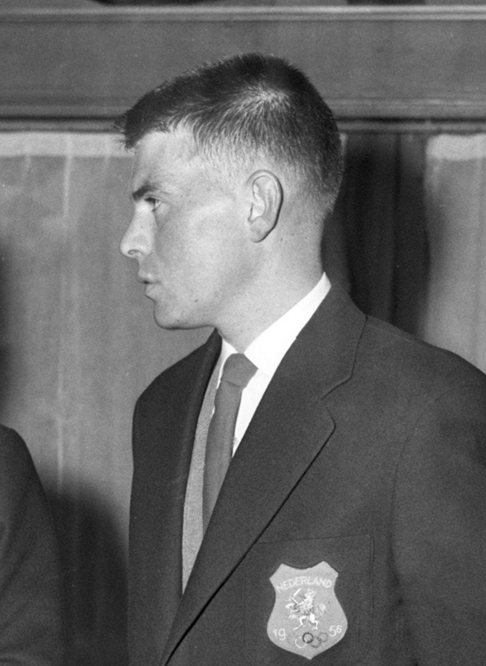 Olympisch kostuum C. Gastelaars en Jan Buis